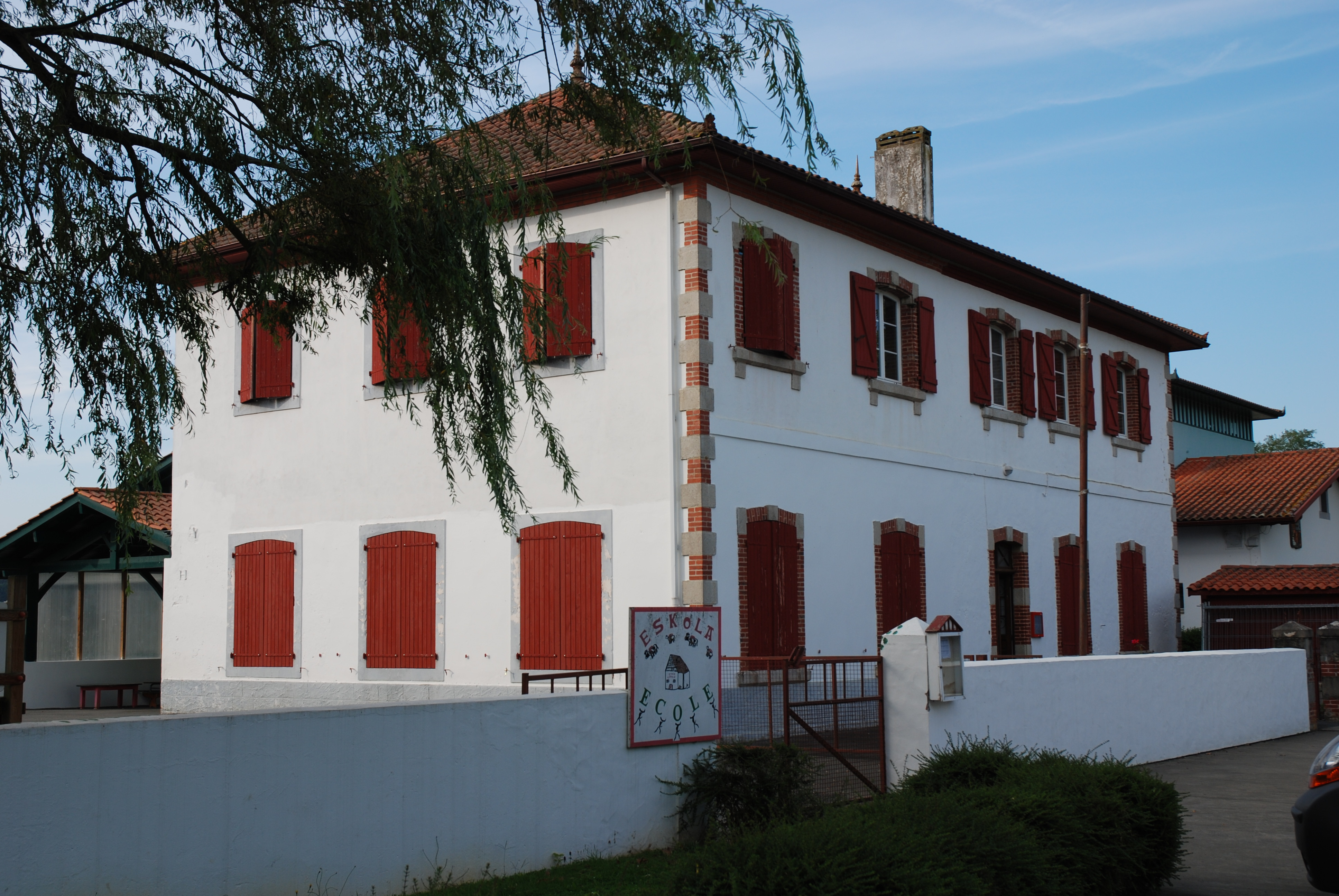 Saint-Martin-d'Arberoue, l'école municipale